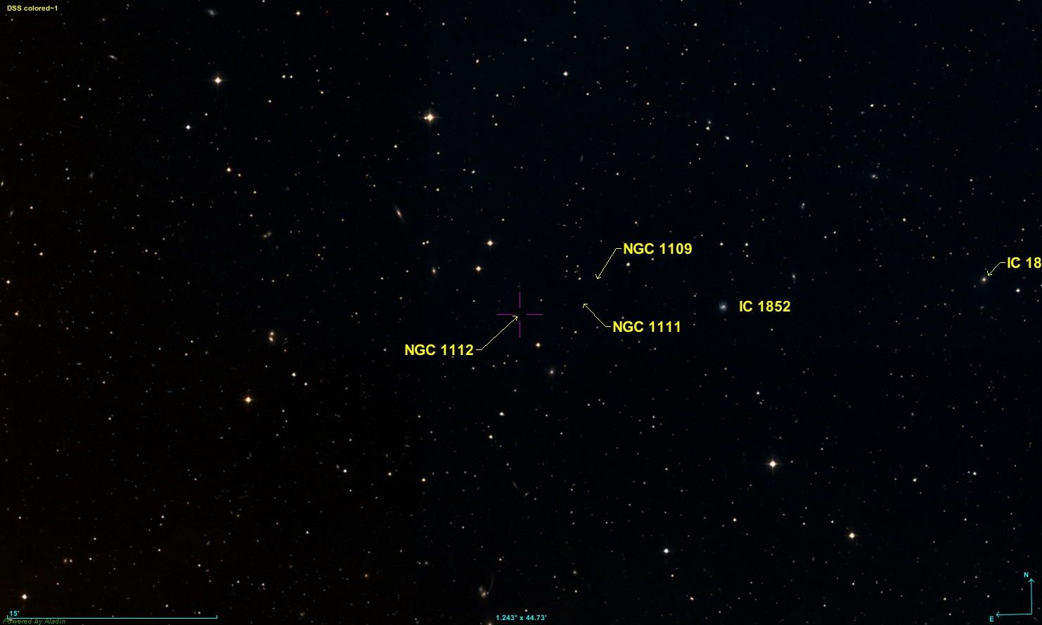 Image créée à l'aide du logiciel Aladin Sky Atlas du Centre de Données astronomiques de Strasbourg et des données de DSS (Digitized Sky Survey).